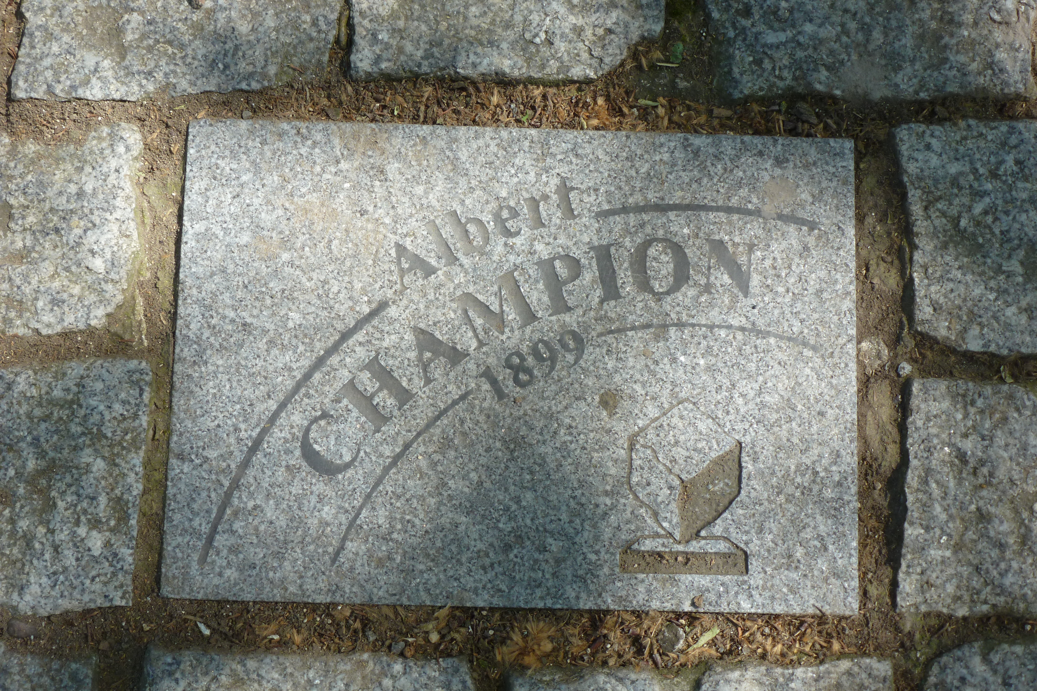 Pflasterstein für Albert Champion auf der Allee Charles Crupelandt in Roubaix